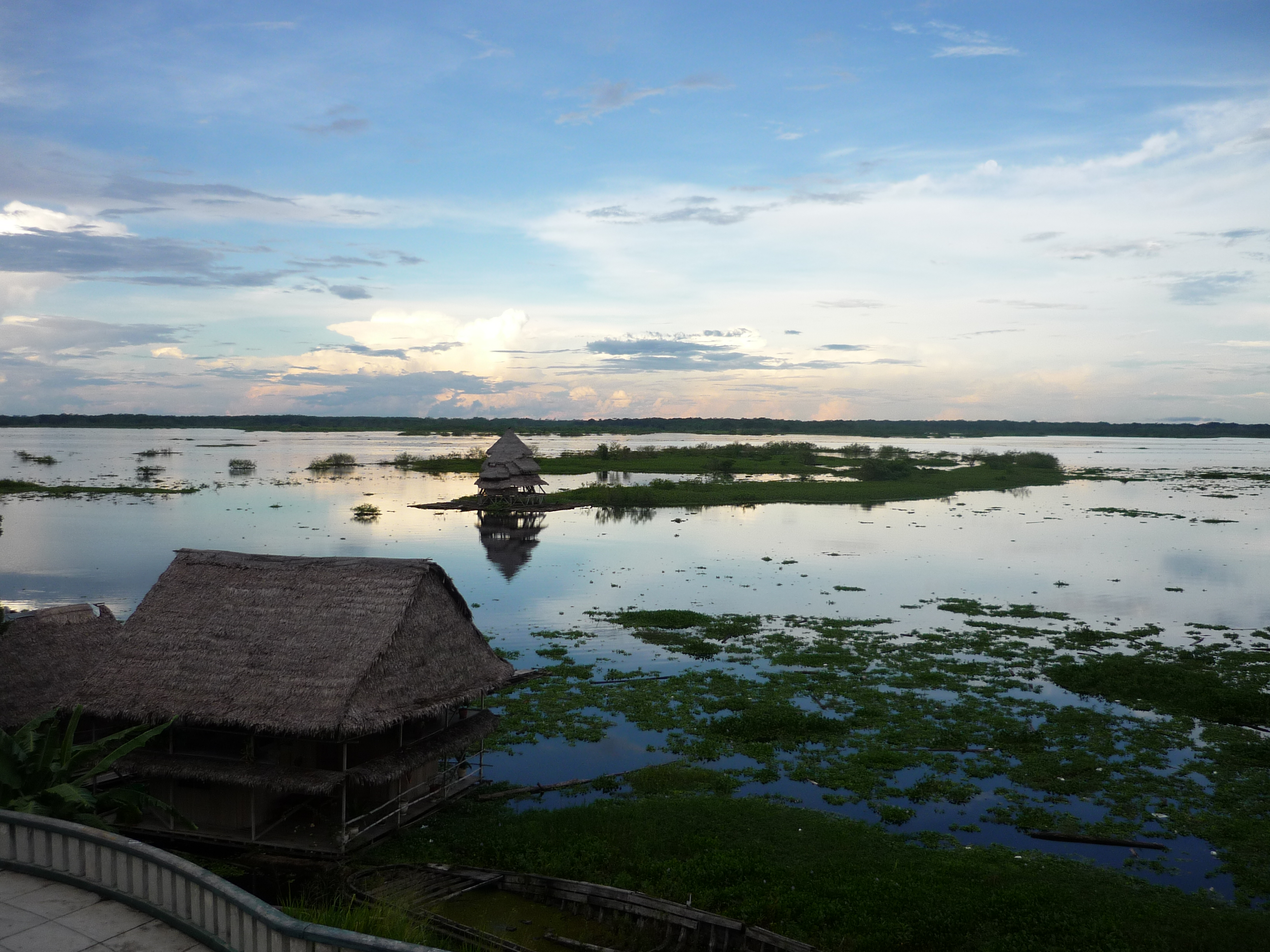 Un tipico atardecer de Iquitos